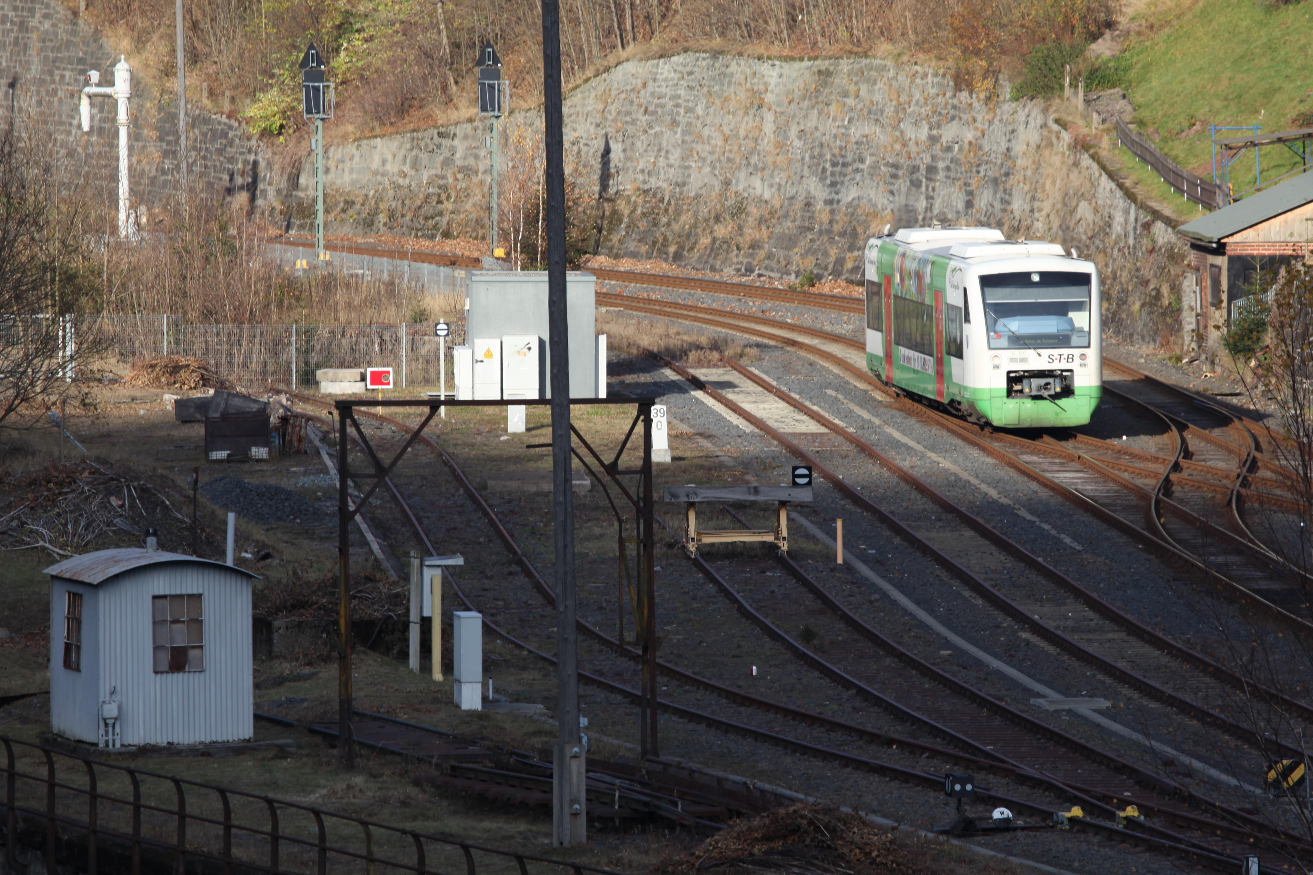 Bahnhof Lauscha mit Gleiswaage, Lademaß, Wasserkran und Stellrechner